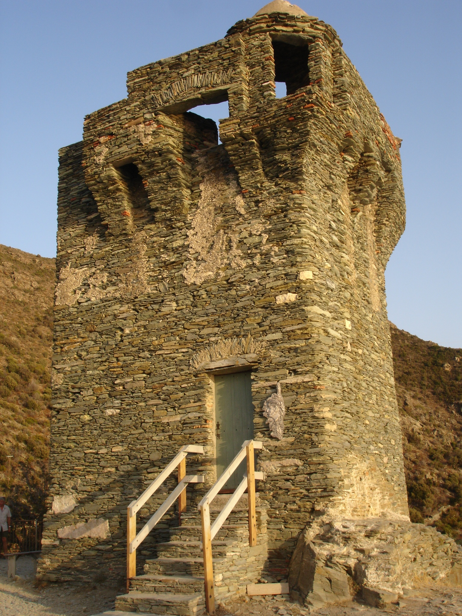 France, Haute-Corse (2B), Nonza, tour paoline